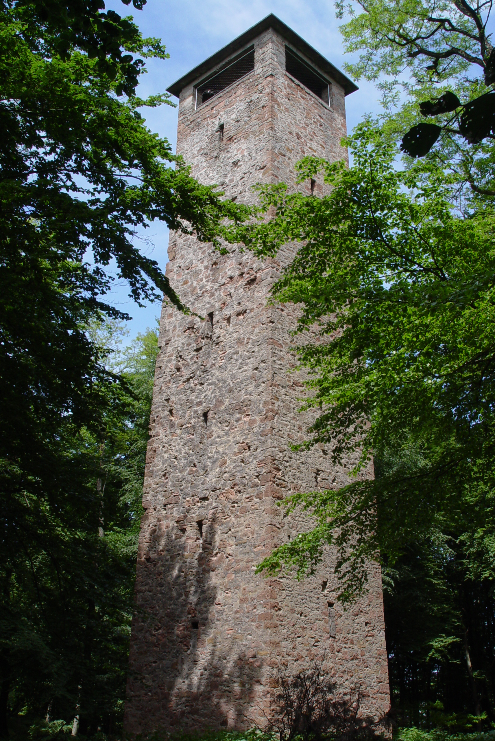 Aschaffenburg-Schweinheim, Aussichtsturm von 1937 auf dem StengertsThis is a photograph of an architectural monument.